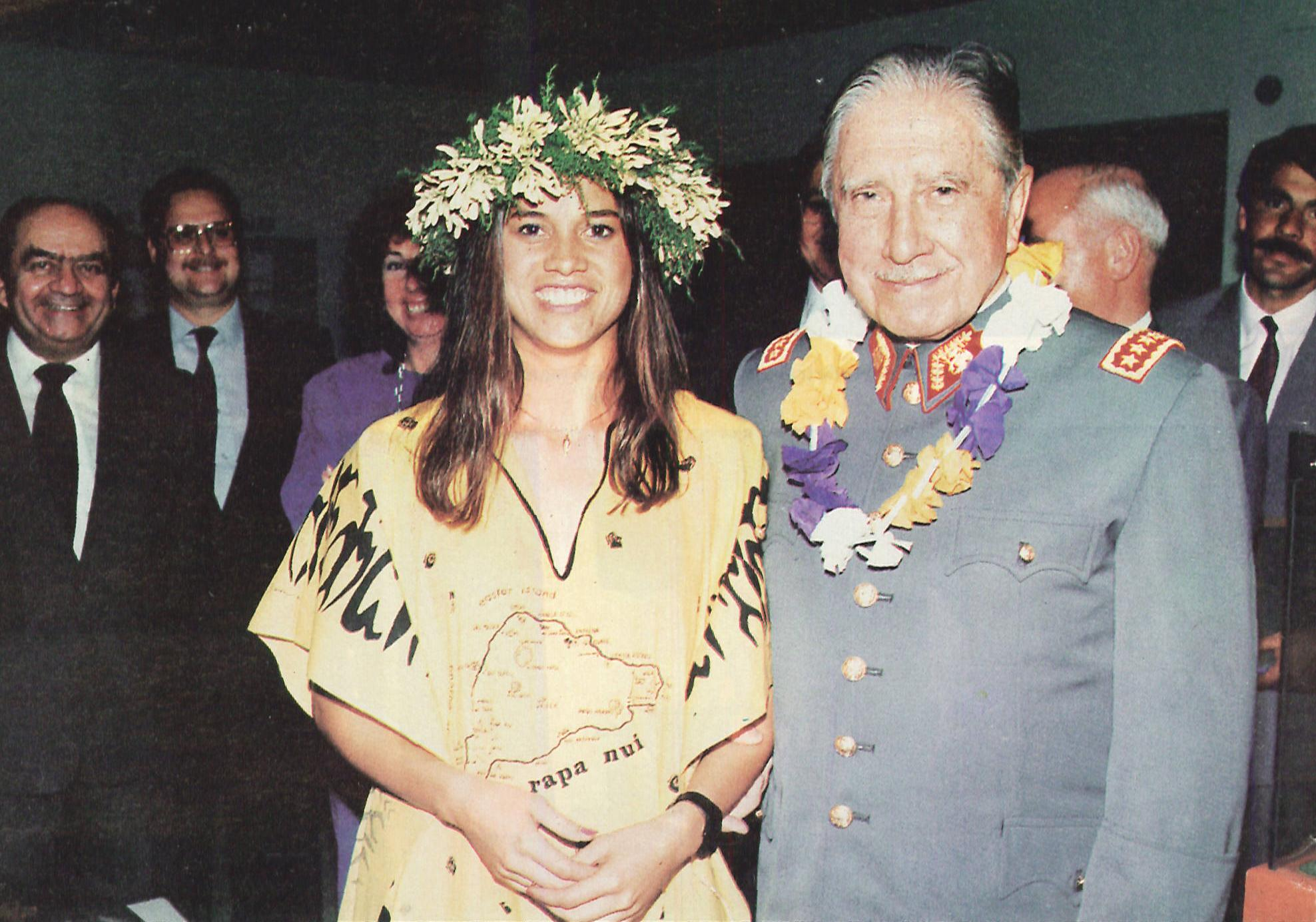 Fotografía del General Pinochet junto a una pascuense